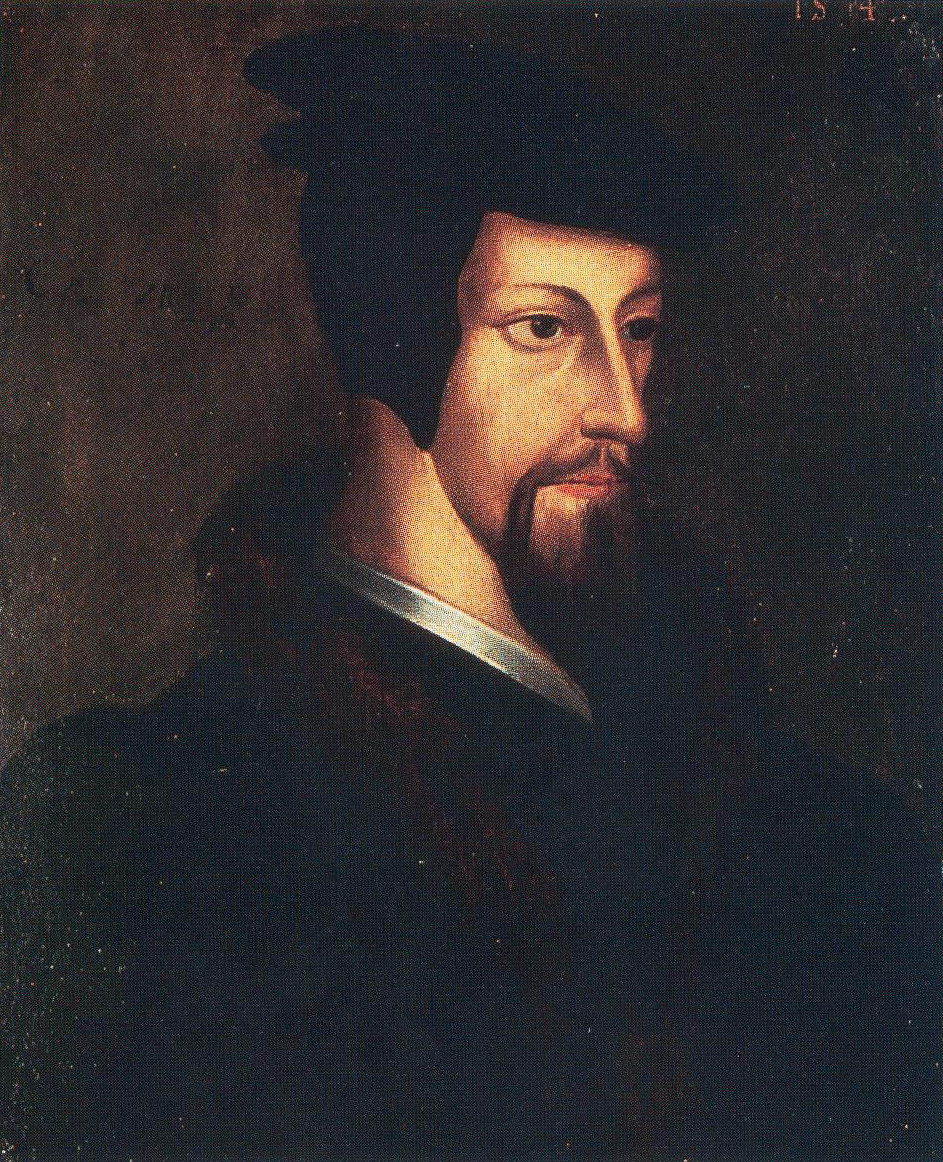 Le théologien et réformateur français Jean Calvin (1509-1564). École flamande. Portrait de Jean Calvin jeune (Portrait of Young John Calvin).